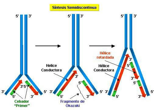 fragmentos de okazaki en la hebra rezagada de ADN durante su replicación